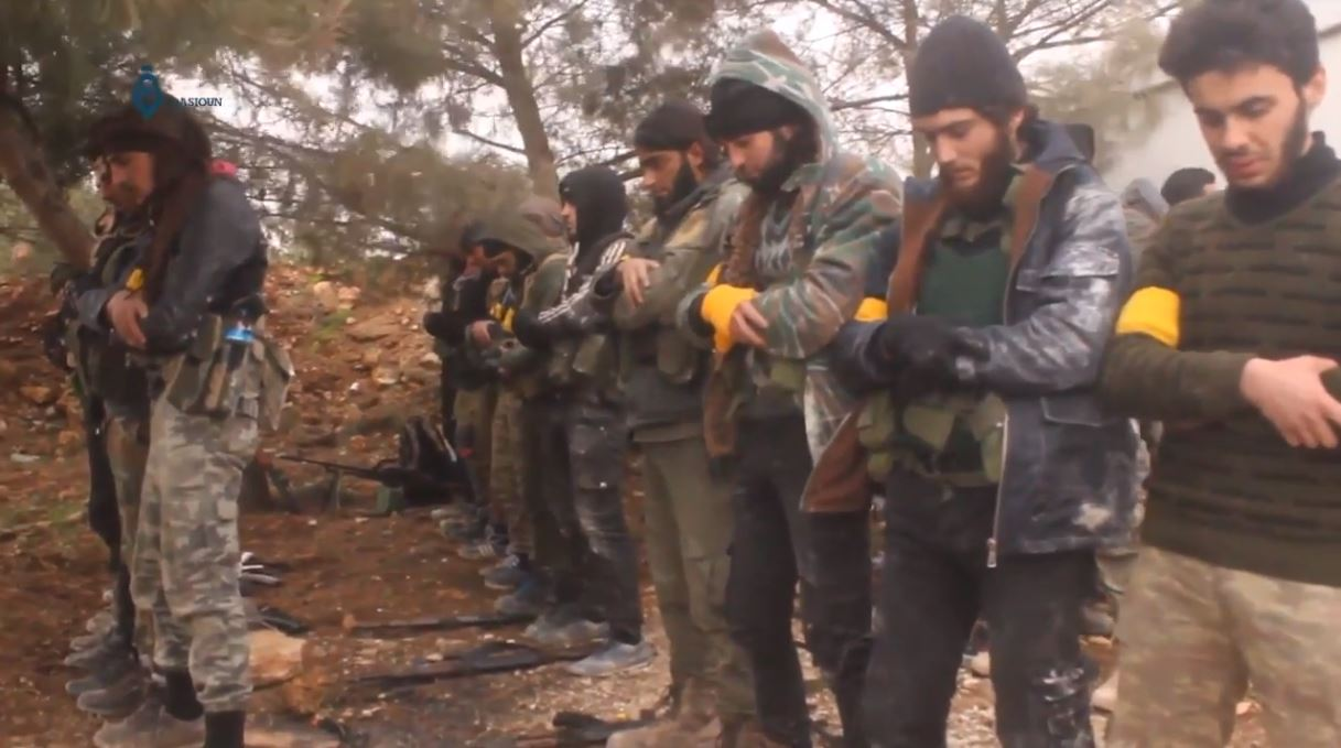 Rebelles de l'Armée syrienne libre lors de l'offensive d'Afrine contre les Kurdes des YPG, 25 janvier 2018.